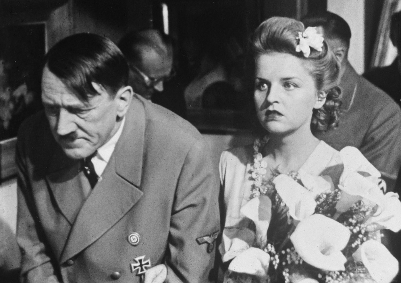 Scenes uit de Russische film "Padeniye Berlina" ("The Fall of Berlin", "Val van Berlijn") [uitgebracht door Actueelfilm], Adolf Hitler (V. Savelyev) en Eva Braun